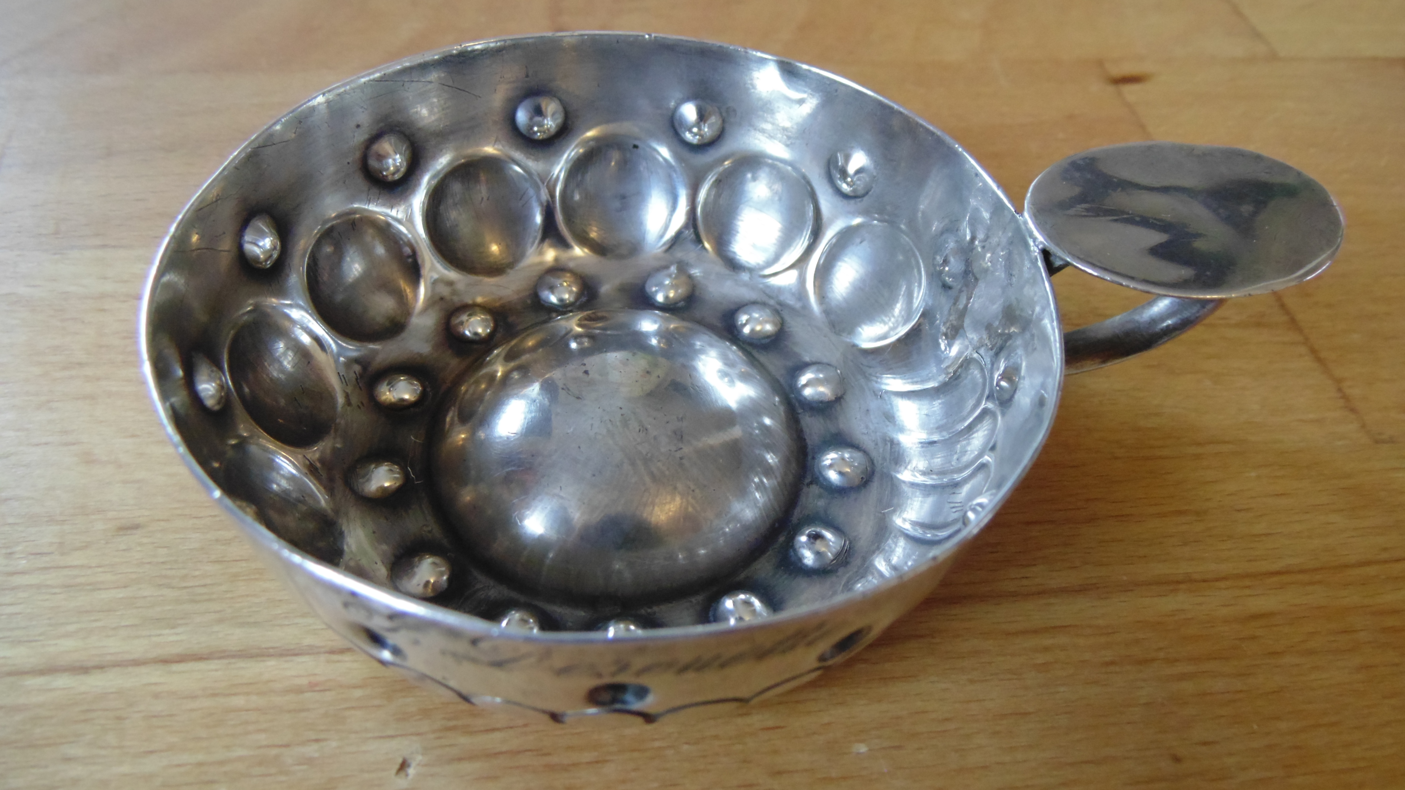 Tastevin en argent massif